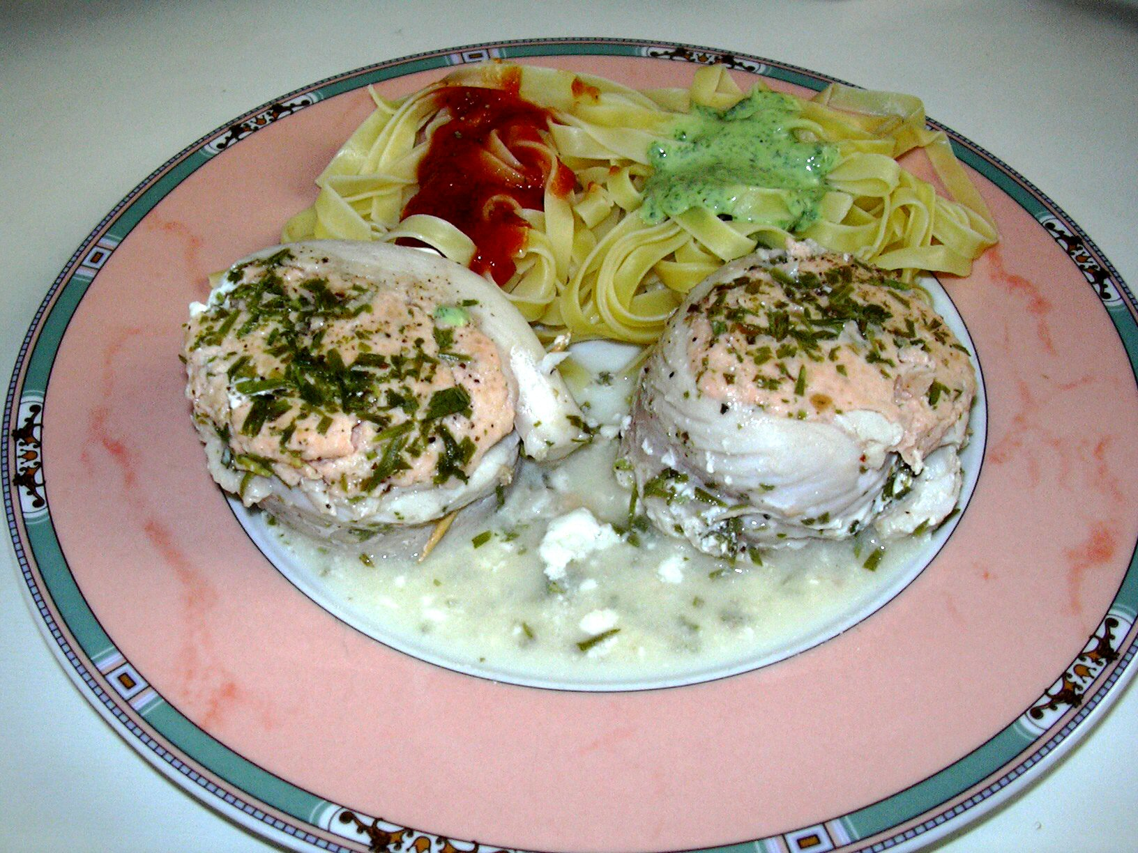 roulade de poisson